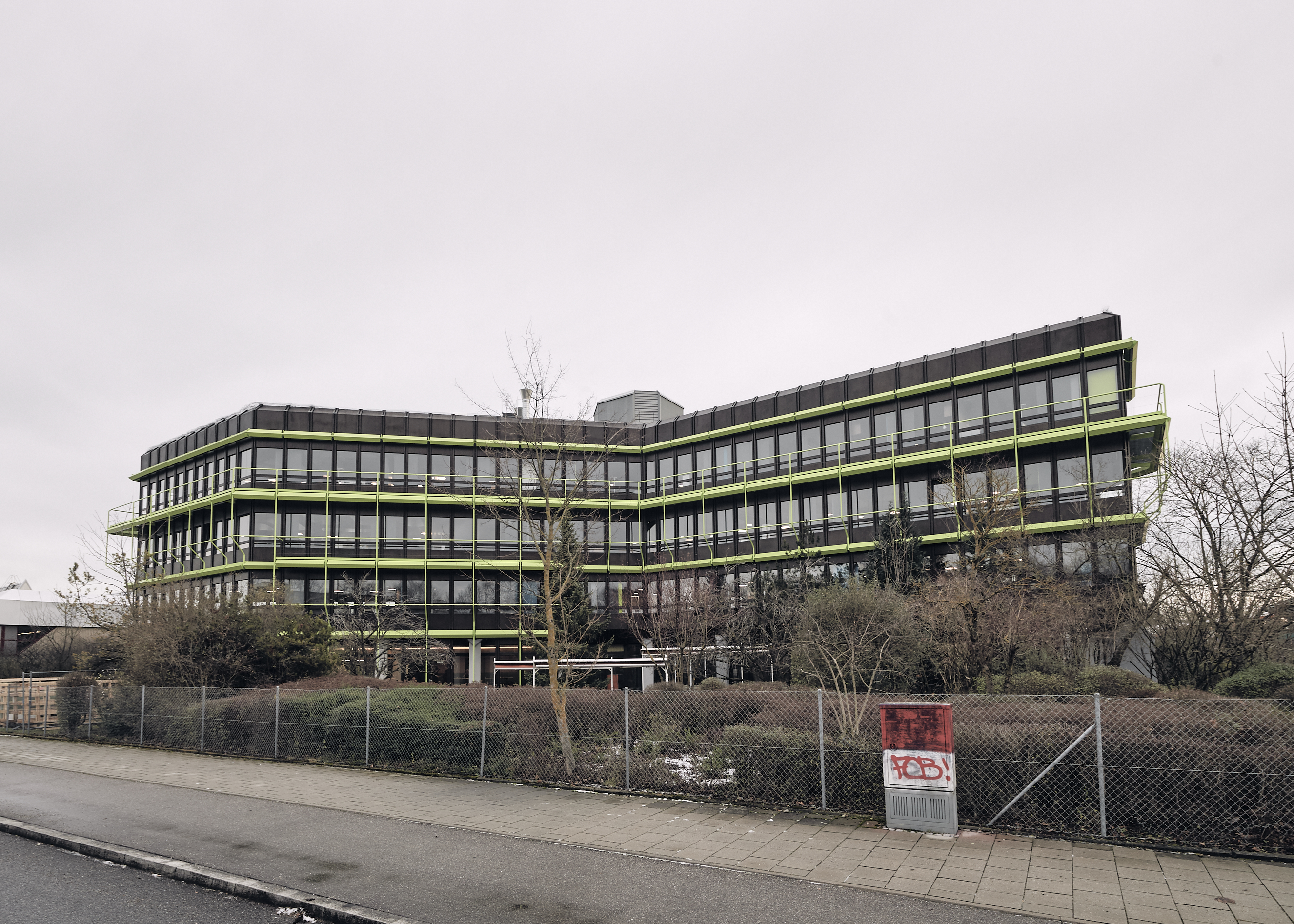 MELO Group Firmenzentrale in München